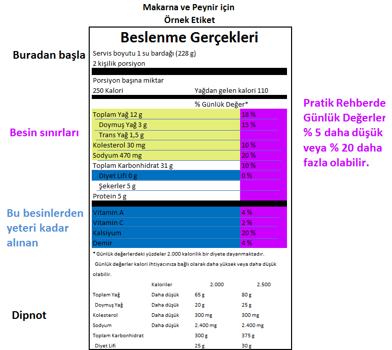 Makarna ve peynir için örnek beslenme etiketi